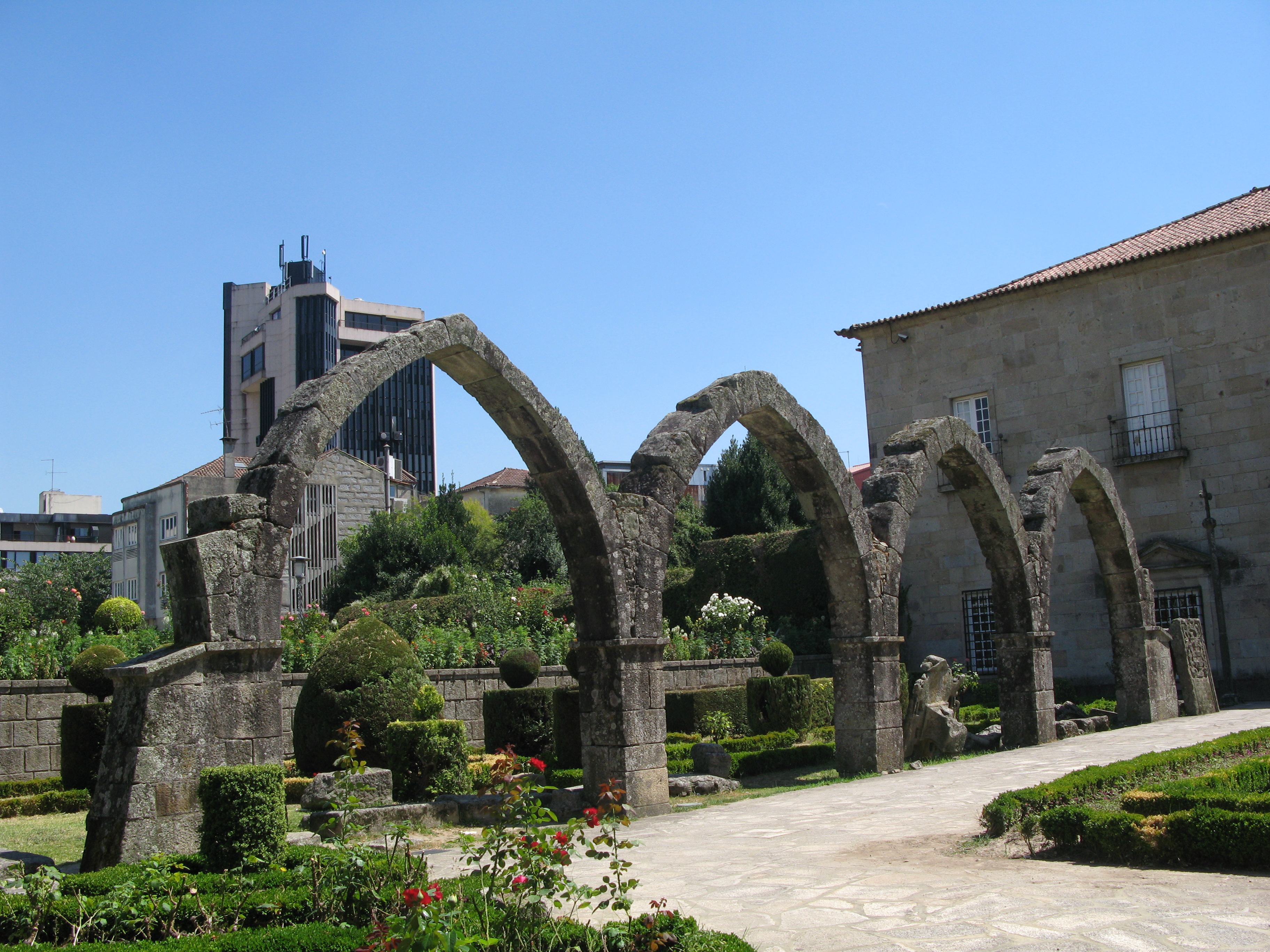 Arcos do Jardim de Santa Bárbara, em Braga.